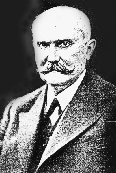 František Maloch (1862 - 1940), Český botanik a učitel.